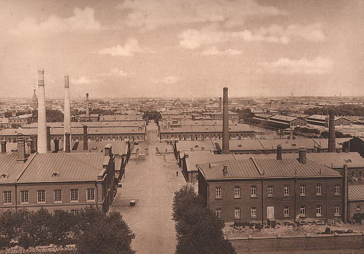 Комплекс зданий городских боен на Сукином болоте. Построены в 1888 году.